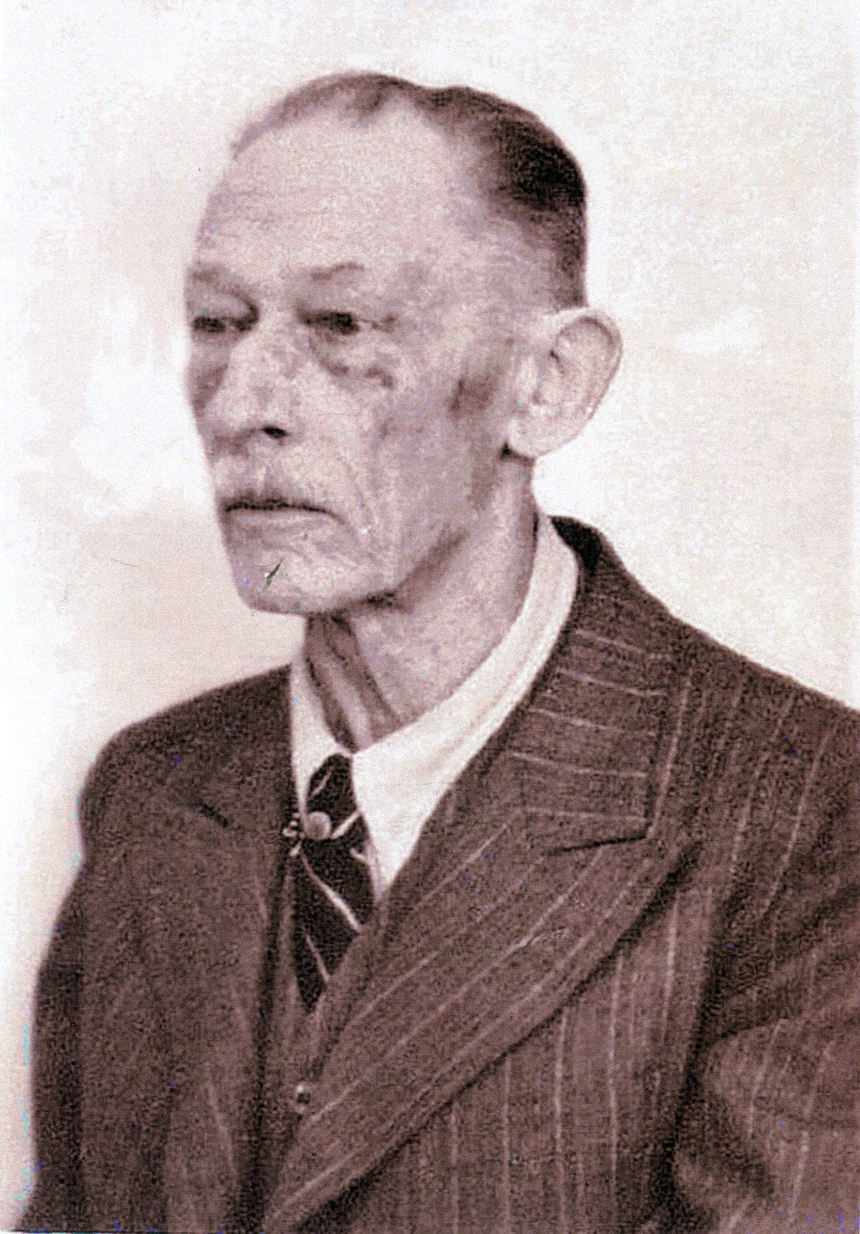 An seinem 80. Geburtstag in Hausham